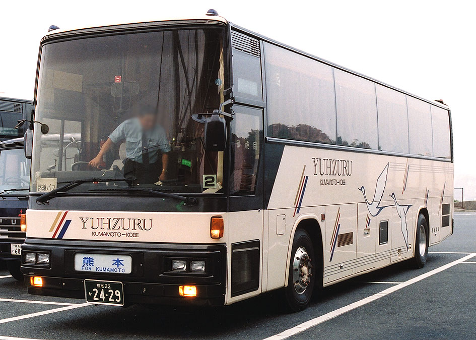 熊本電鉄 ユウヅル P-LV719R 西工SD-I